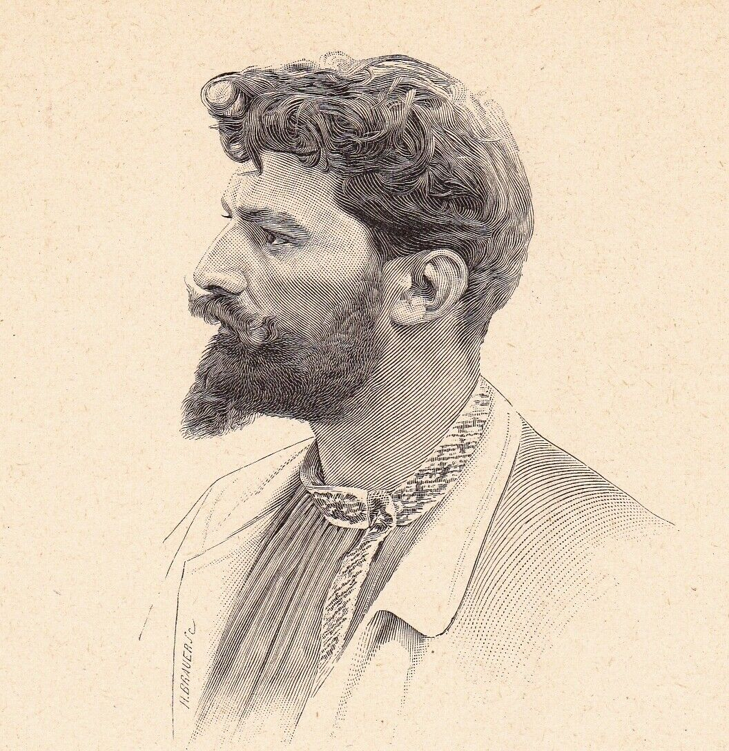 Portrait de William Barbotin, graveur, peintre et sculpteur (1861-1931). Joseph Uzanne, Figures contemporaines tirées de l’Album Mariani, Librairie Henri Floury, Paris, vol VIII, 1903, Bibliothèque nationale de France